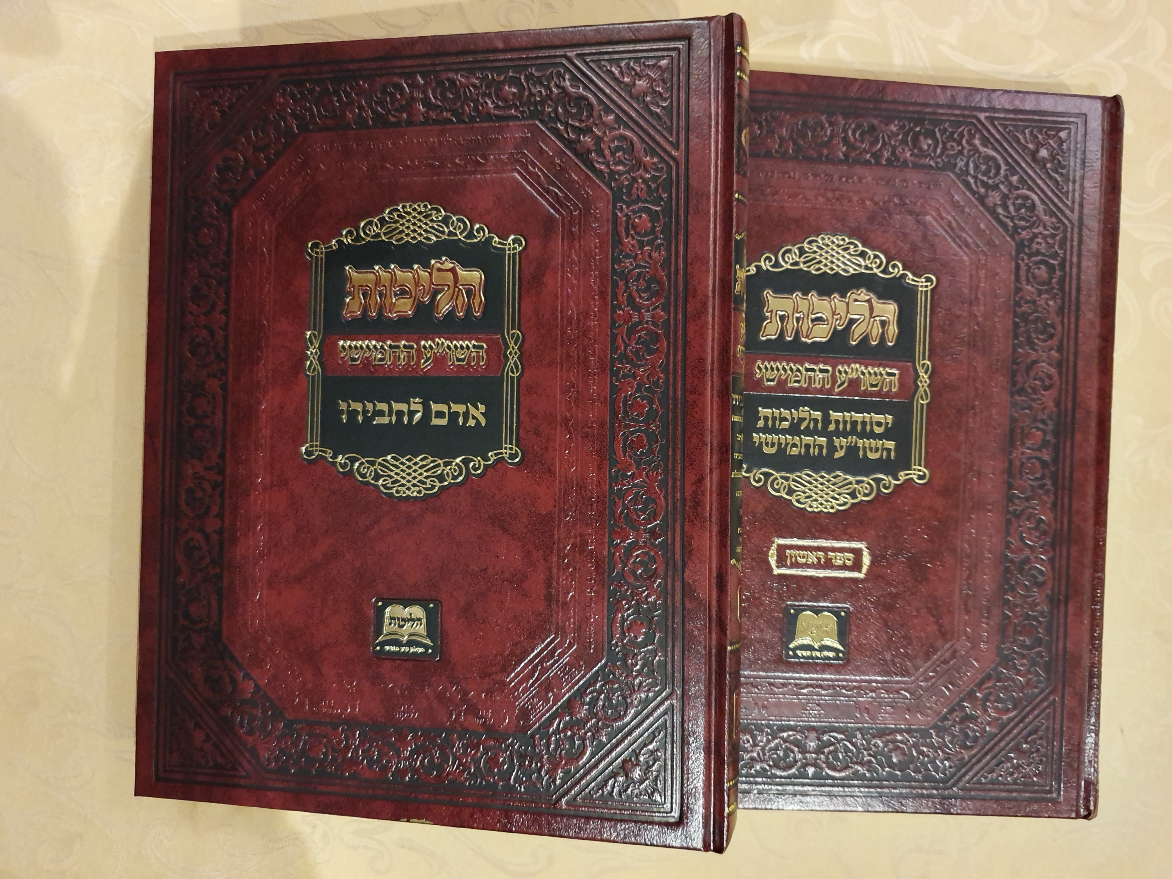 כרך המבוא הוא כרך הכולל את כל המבואות החשובים לשבעת חלקי השולחן ערוך החמישי. כרך ב' עוסק בתחילת הליכות שבין אדם לחבירו